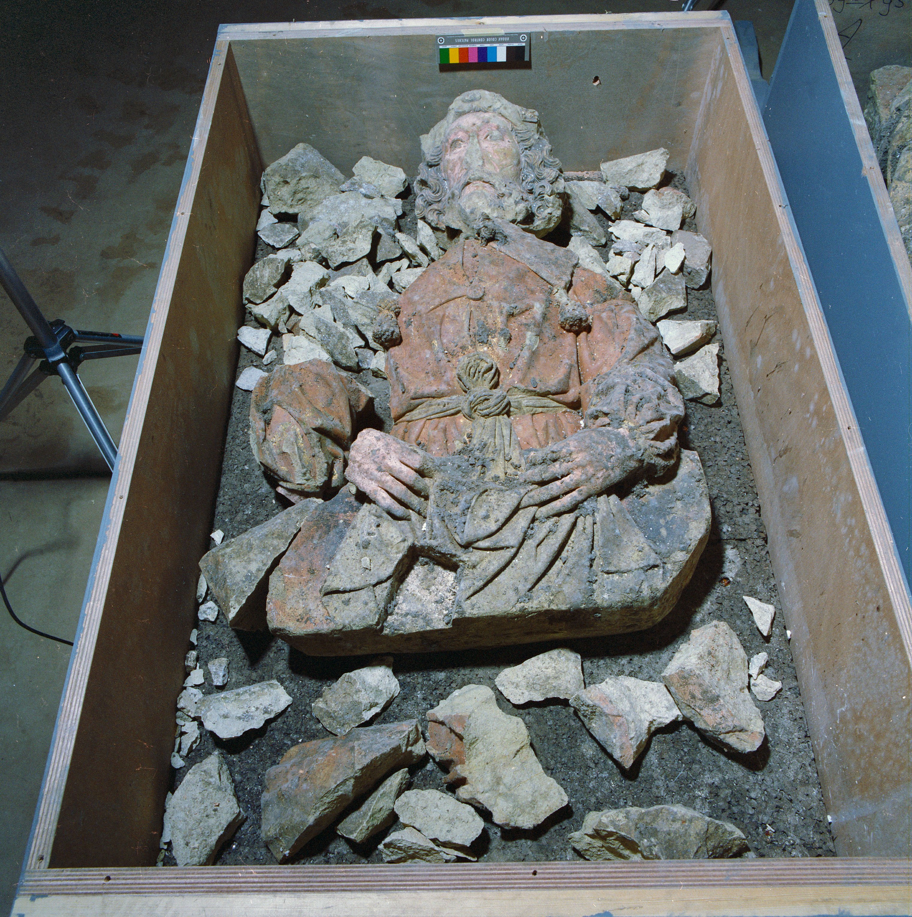 Nederlands Hervormde Kerk: beschimmeld beeld